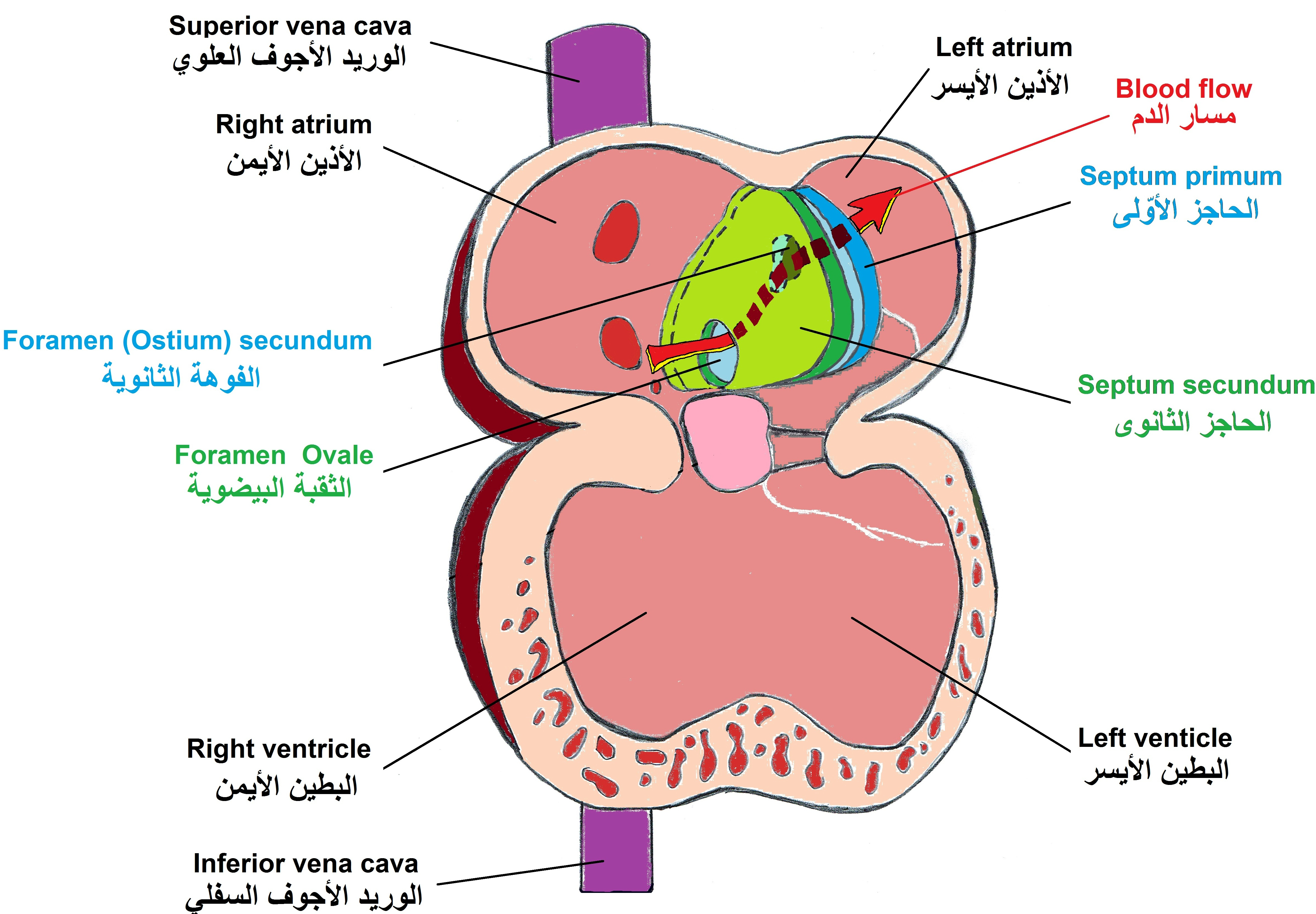 Septum primum and Septum secundum - early 7th week. الحاجز الأولي و الحاجز الثانوي فى قلب الجنين - الأسبوع، السابع 43 يوما